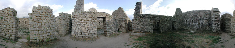 Panoramic photo Machu Picchu, Peru